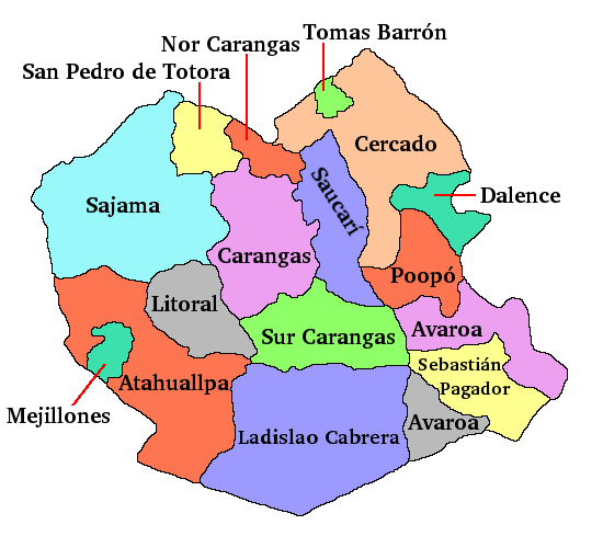 Carte du département de Oruro en Bolivie